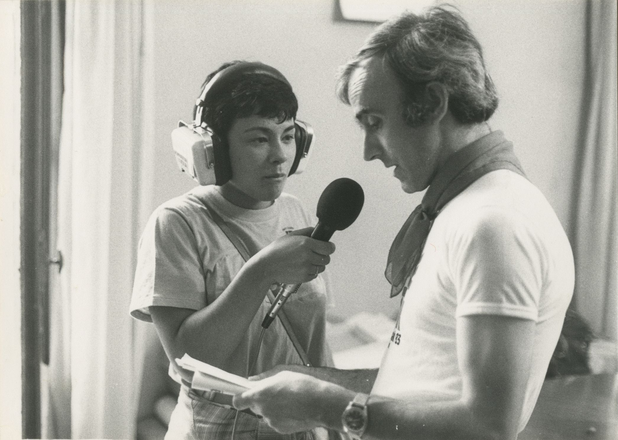 Entrevista de la reportera Maialen Iriarte al alcalde Roberto López de Etxezarreta